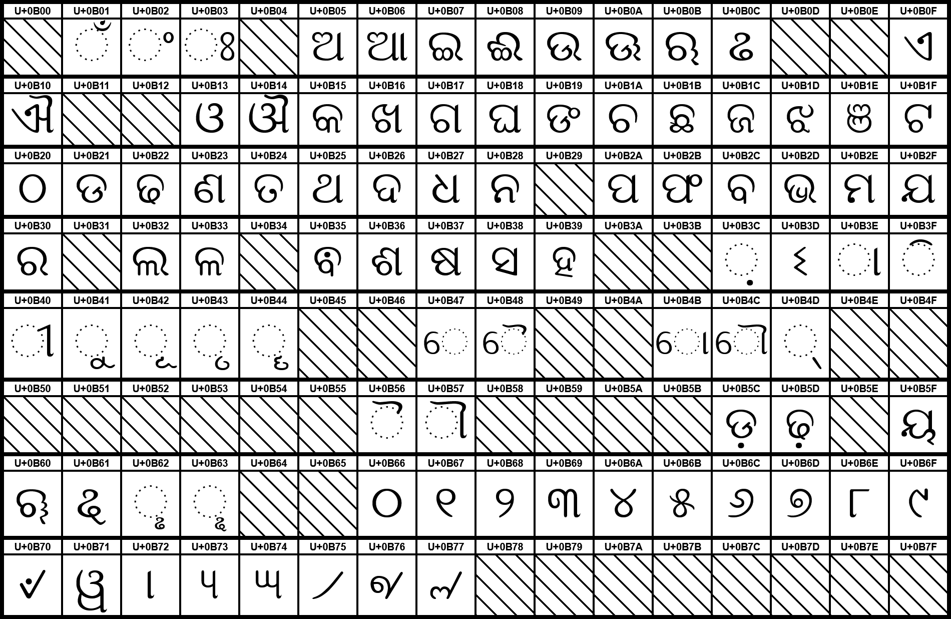 Grafiktafel für den Unicodeblock Oriya. Schraffierte Felder sind unbesetzte Codepoints. Hellgrau gefärbte Felder kennzeichnen bisher fehlende Zeichen.